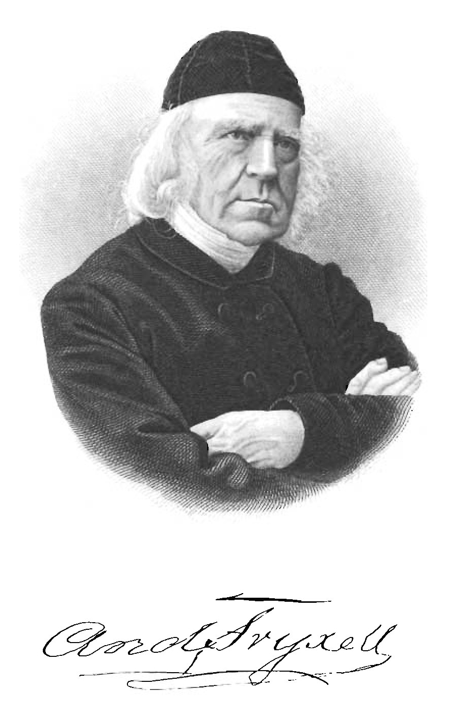 Anders Fryxell (1795-1881)